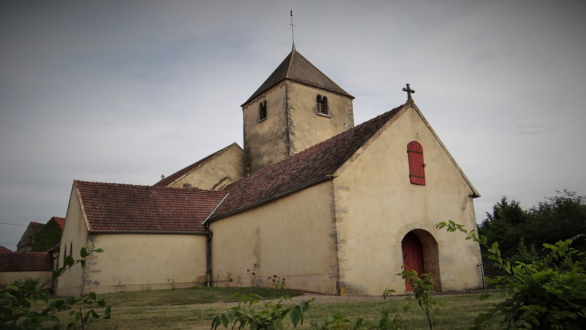 Église de Sarry